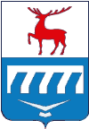 Заволжье. Утвержден 6 августа 1984 г. Описание герба: "Щит пересеченный. В верхнем серебряном поле идущий червленый олень. В нижнем лазуревом поле серебряное стилизованное изображение плотины и летящей птицы, сопровождаемое внизу У-образной эмблемой в серебре же".